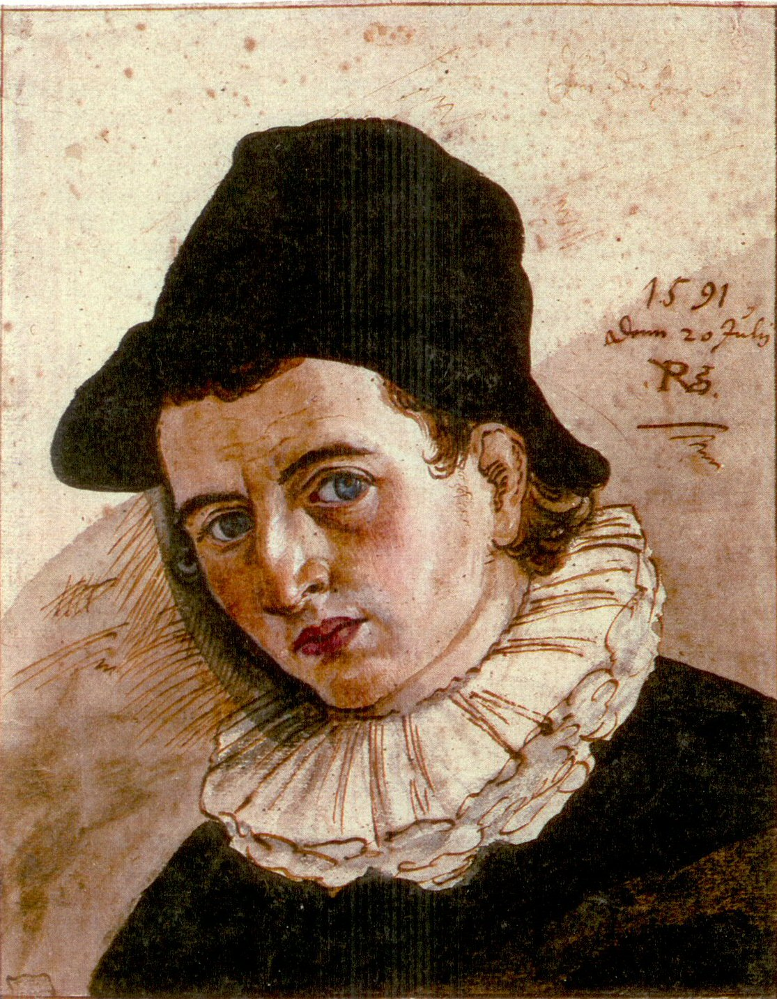 Selbstbildnis des Malers Philipp Uffenbach, 1566 in Frankfurt am Main, † 1636 ebenda Maler, Zeichner, Aquarellist, Radierer und Kupferstecher in der Tradition von Matthias Grünewald und Albrecht Dürer, Lehrer von Adam Elsheimer